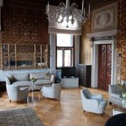 Salotto des Palazzo Barbarigo della Terrazza